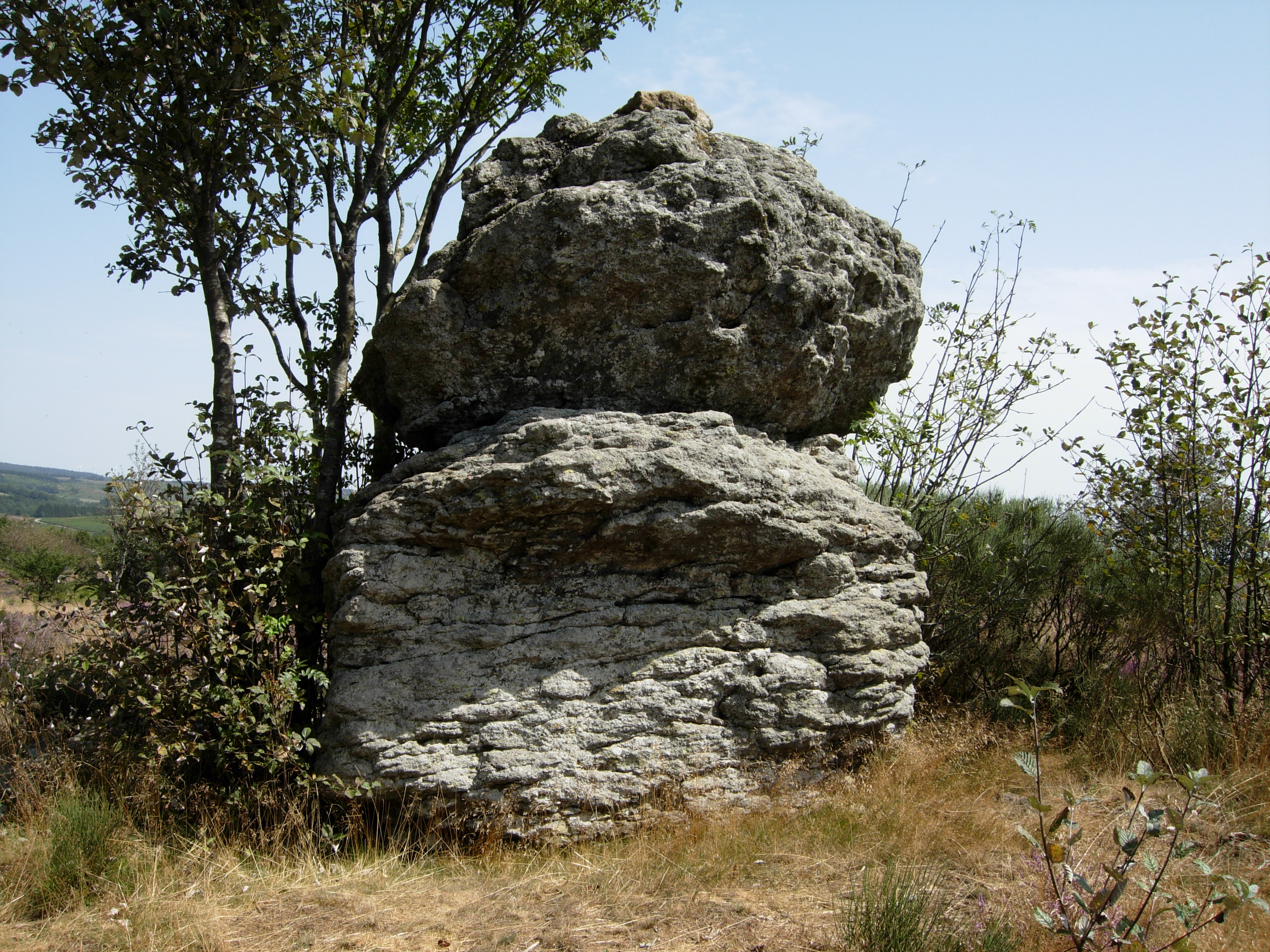 Nages (Tarn) - Rocher de Peyre sus Autre (Pierre sur autre) (1014 m). Ce rocher remarquable puisque composé par une pierre reposant sur une autre pierre, marque depuis des temps immémoriaux, la limite des communes de Nages, Murat-sur-Vèbre et Fraisse-sur-Agout.